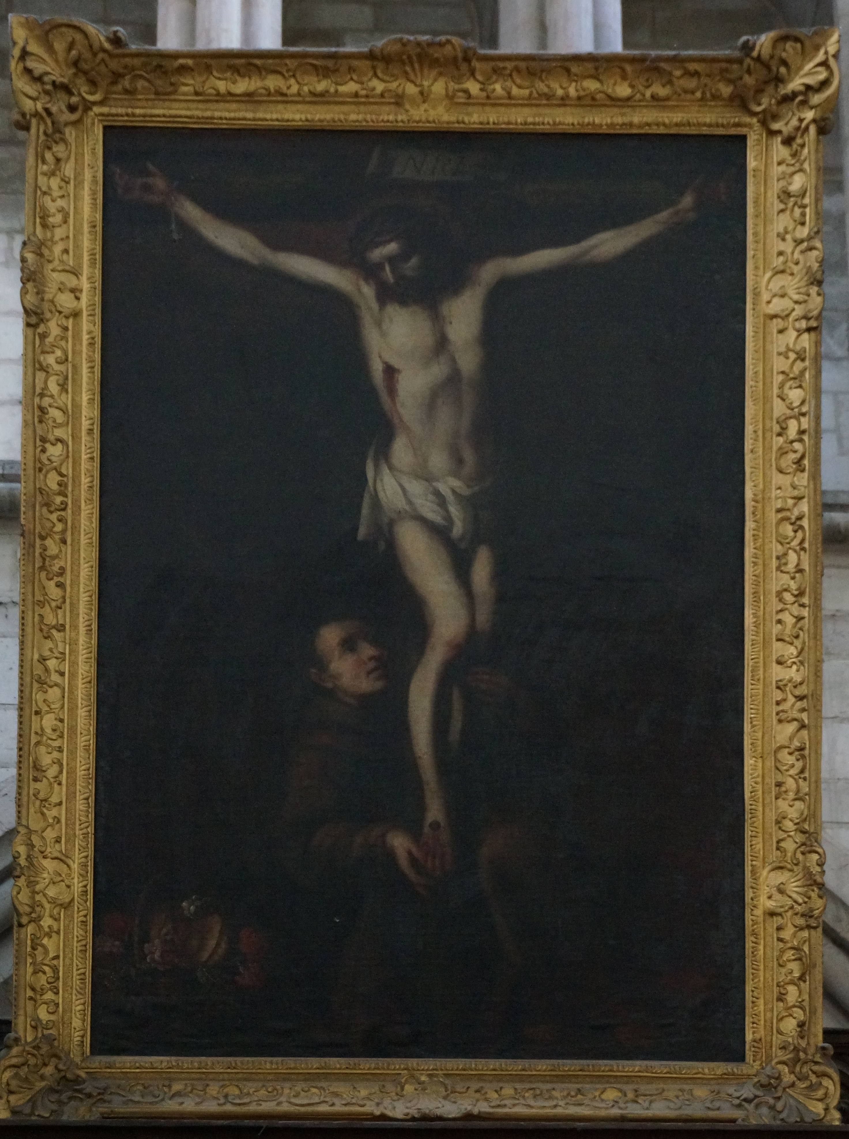 peinture d'un Christ en croix et un capucin en l'église de la Madeleine de Troyes.